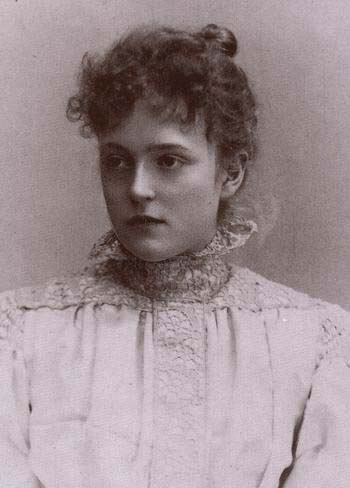 Maria Gabriela de Baviera Marie Gabrielle in Bayern Marie Gabrielle in Beieren Maria Gabriela Bawarska